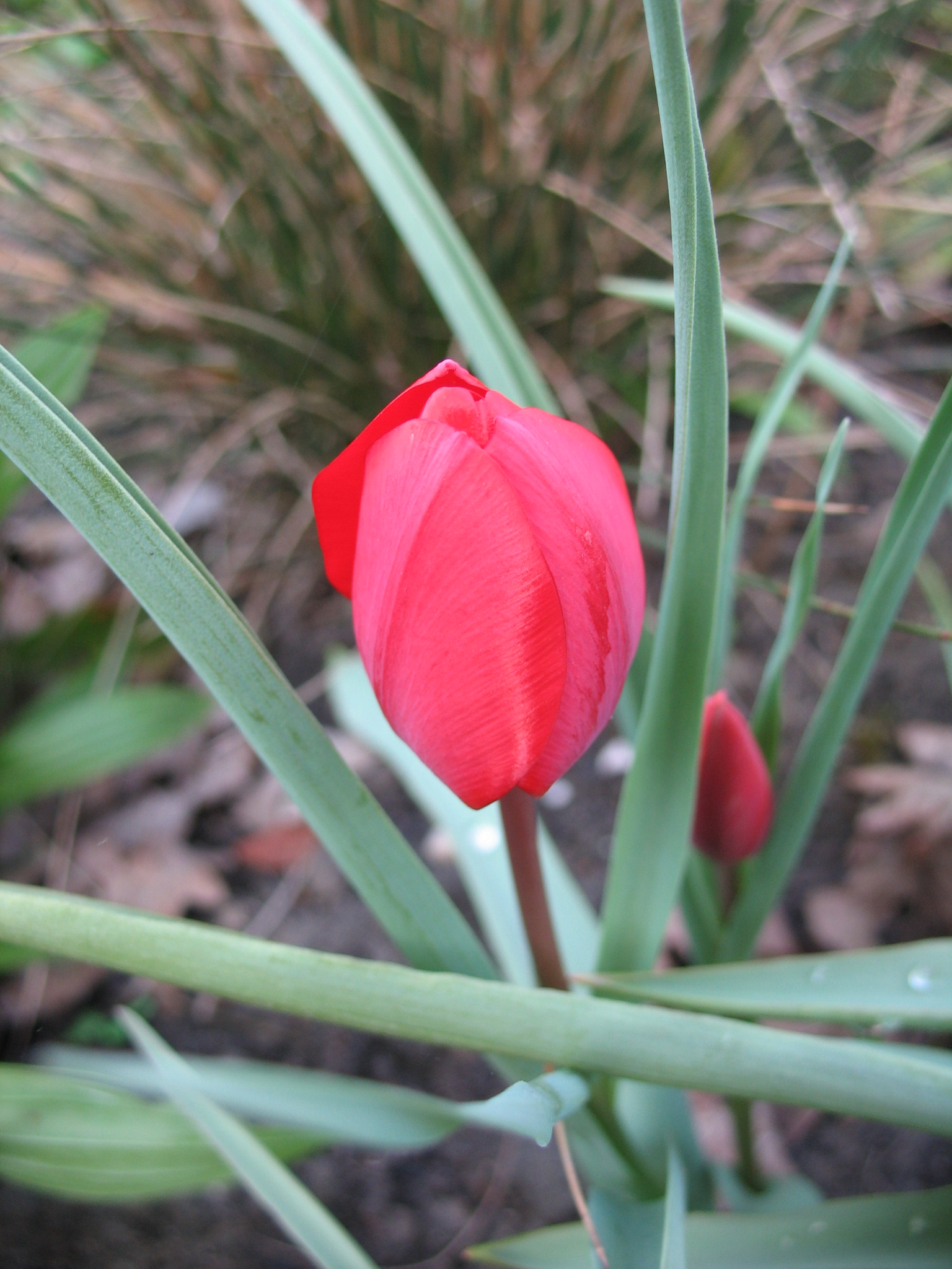 Tulp (Tulipa montana)